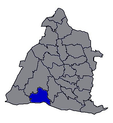 臺灣省彰化縣竹塘鄉。